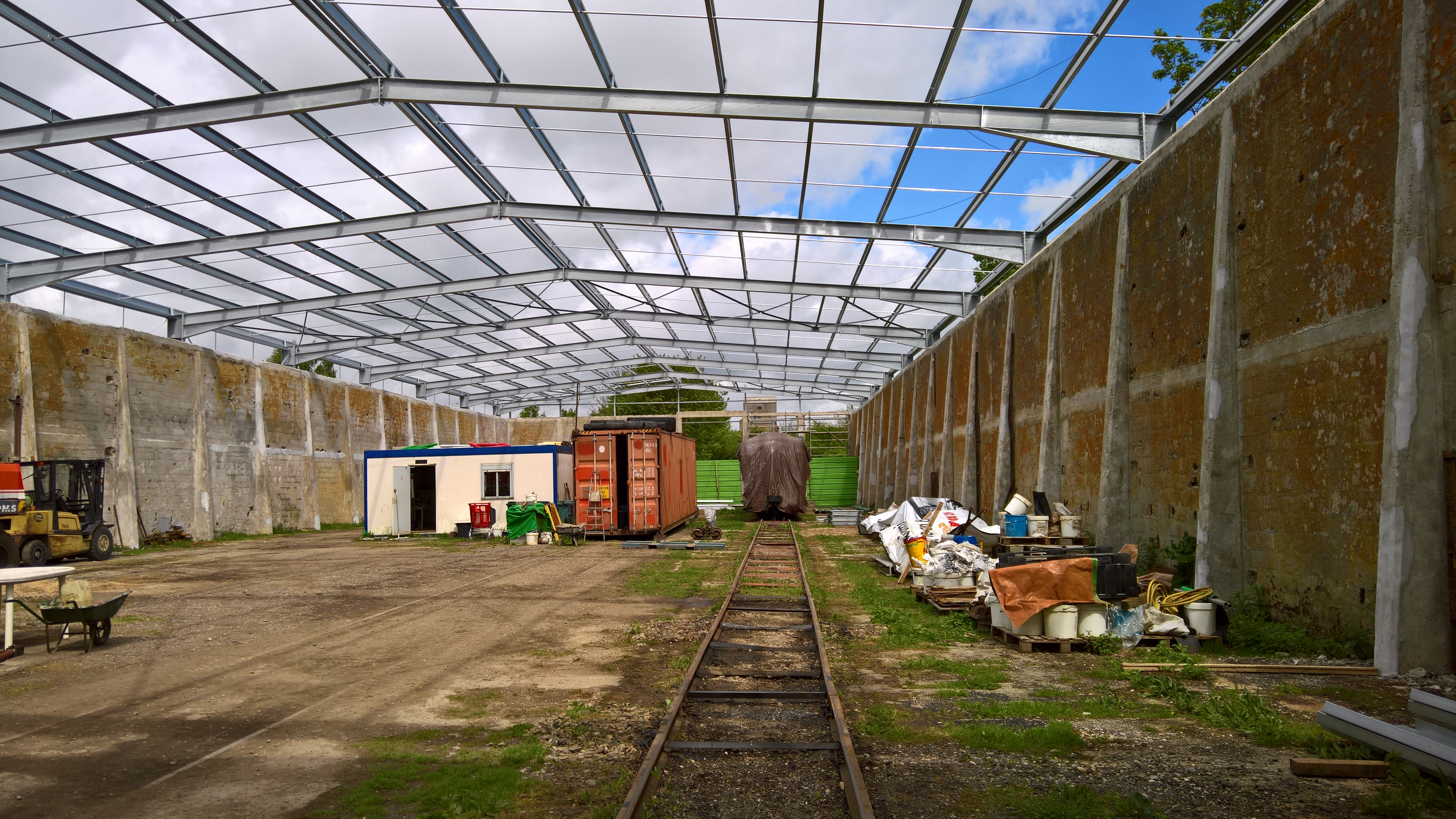 Charpente de la nouvelle toiture du dépôt, financée par la communauté de communes